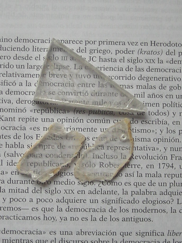 Lapis specularis, yeso especular explotado en época romana para acristalar ventanas.